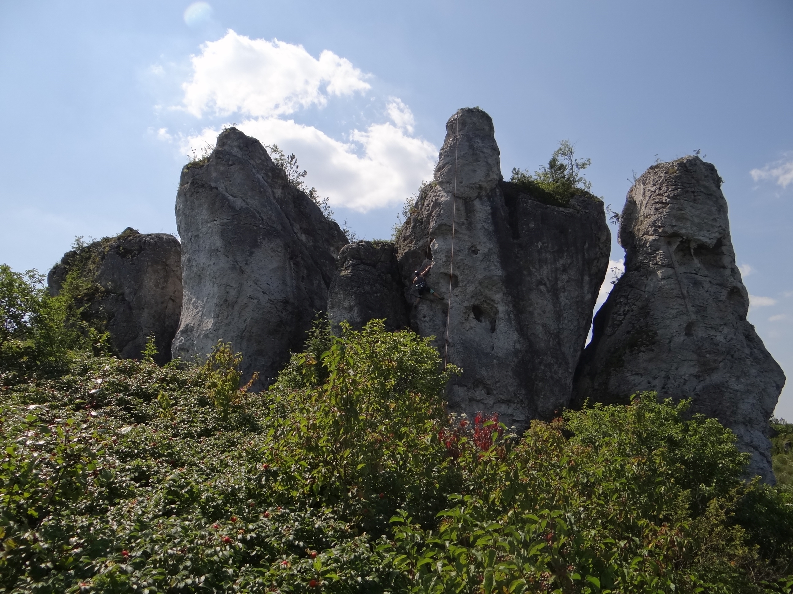 Skały Mirowskie. Grupa Trzech Sióstr